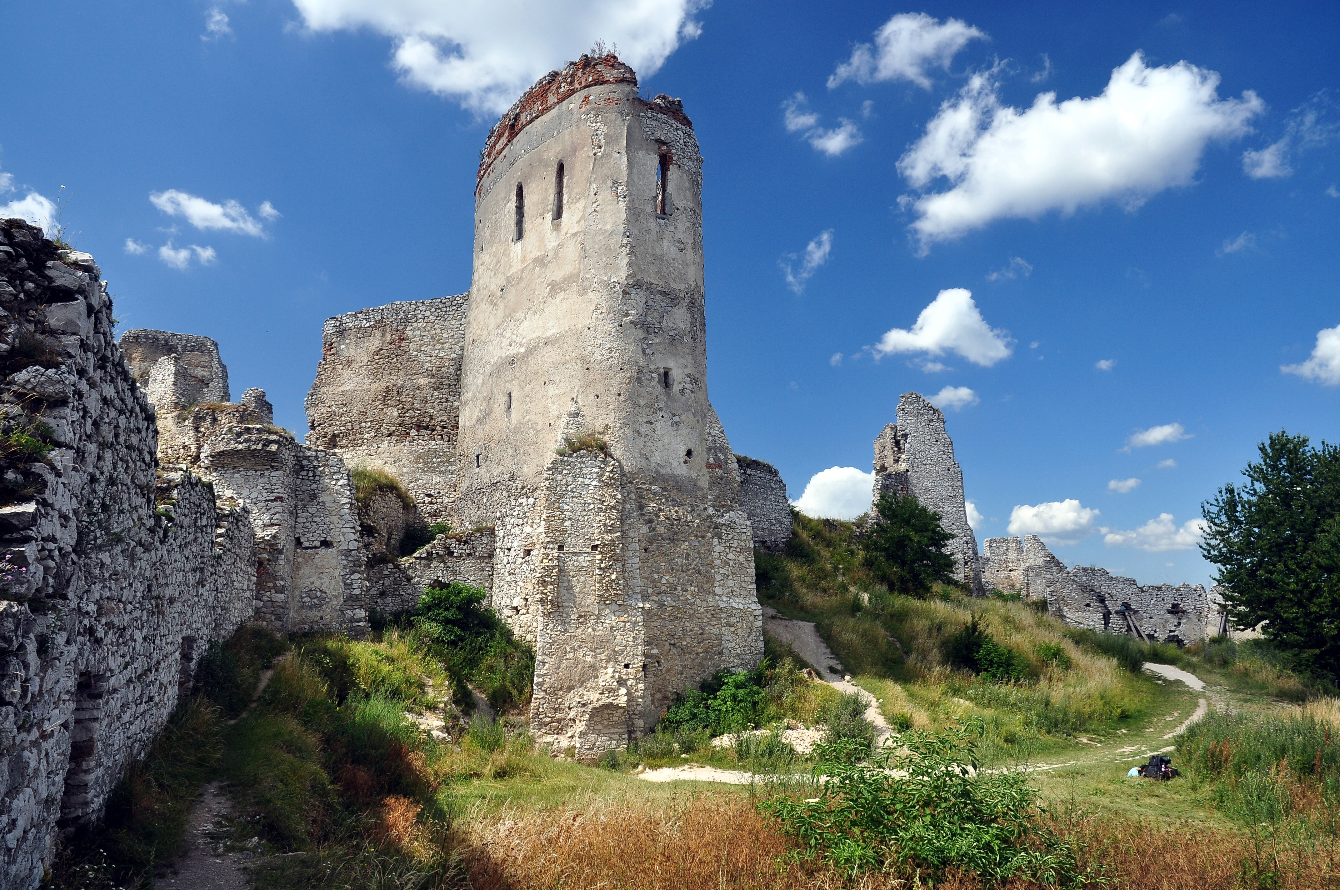 Čachtice, hrad, Slovensko